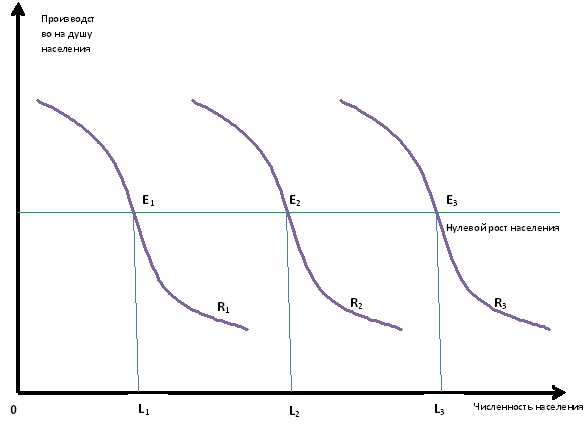 Квазистабильное равновесие в "третьем мире" по Х. Лейбенстайну.